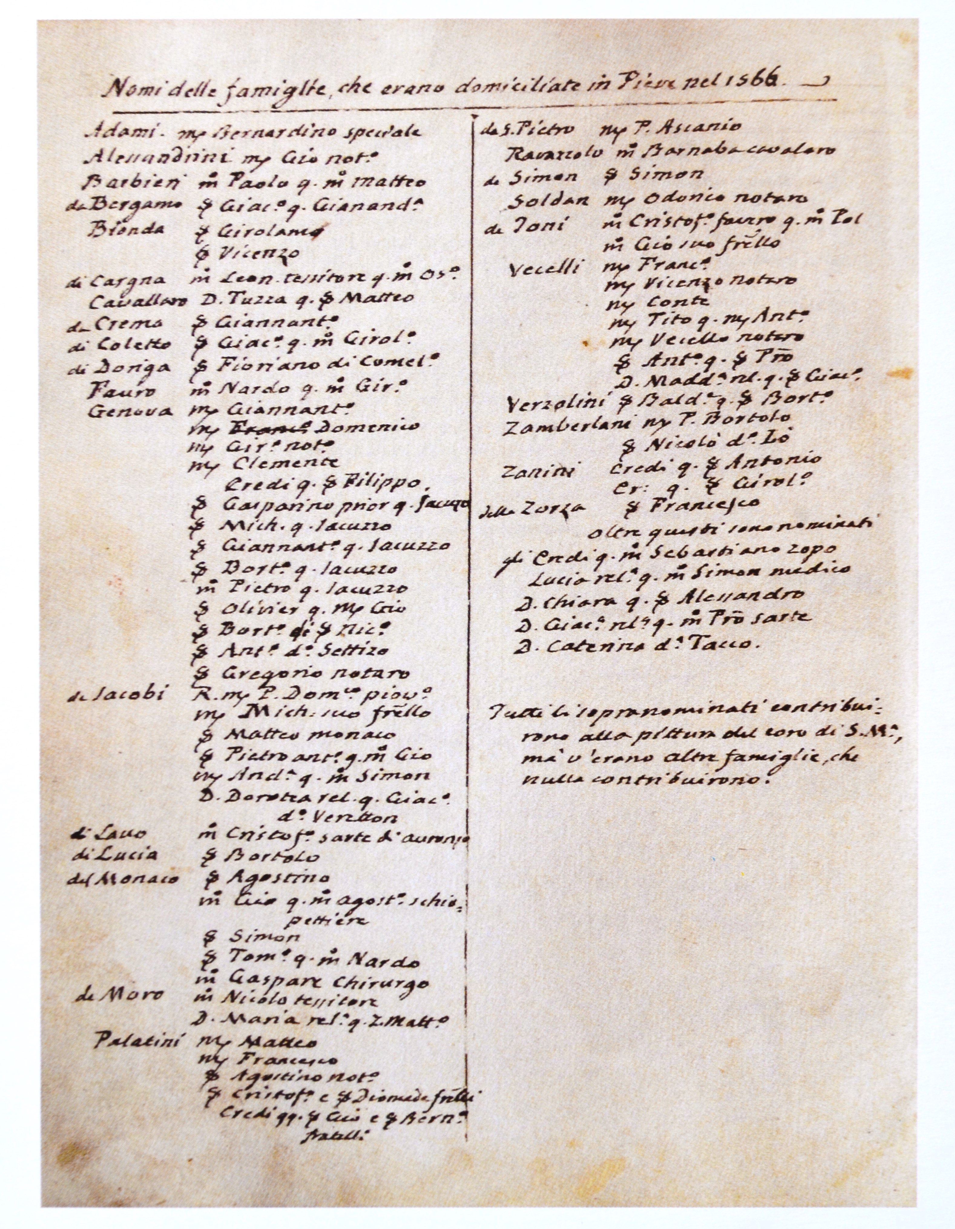 Memorie di Vincenzo Vecellio, annotate da Taddeo Jacobi